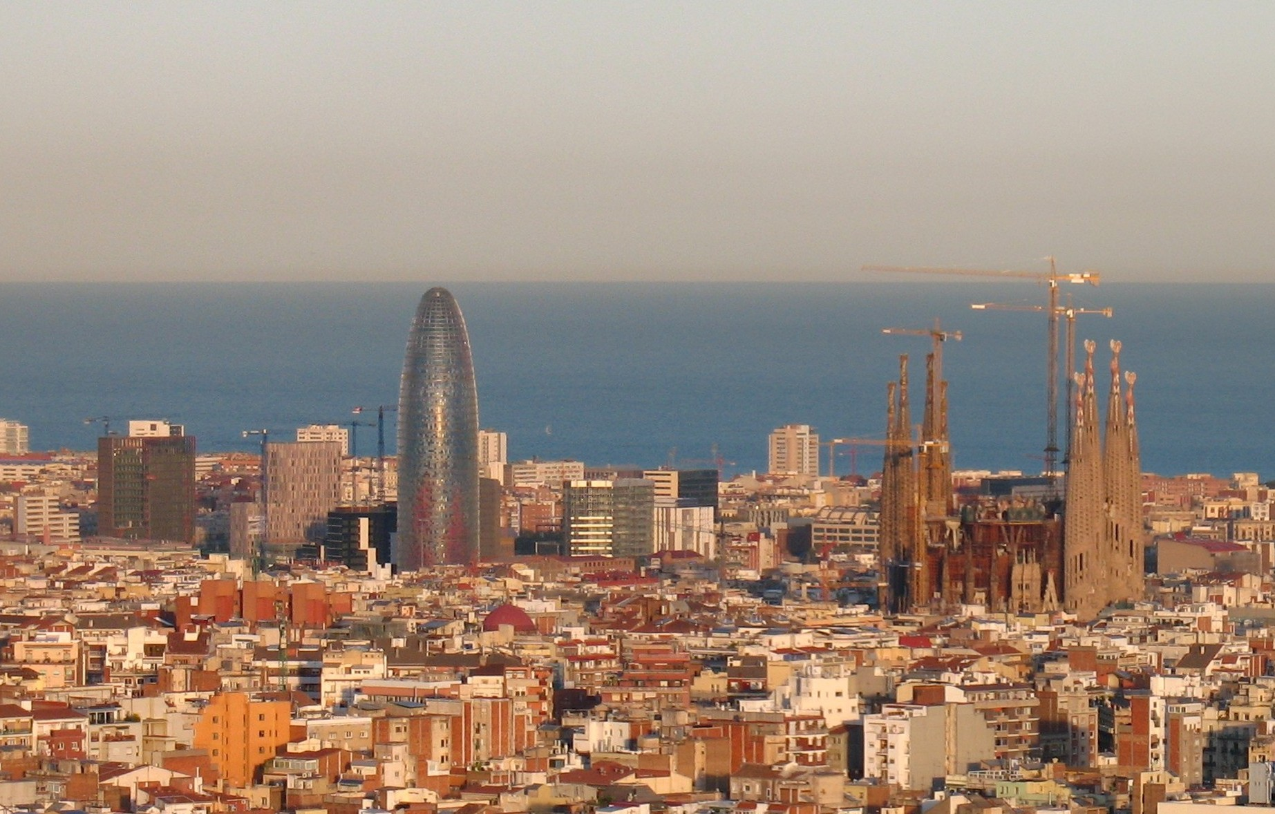 Vista de la Torre Agbar junto a la Sagrada Familia vistos desde el parque del Puiget 2008